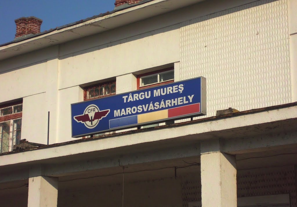 A marosvásárhelyi Nagy Állomás kétnyelvű felirata